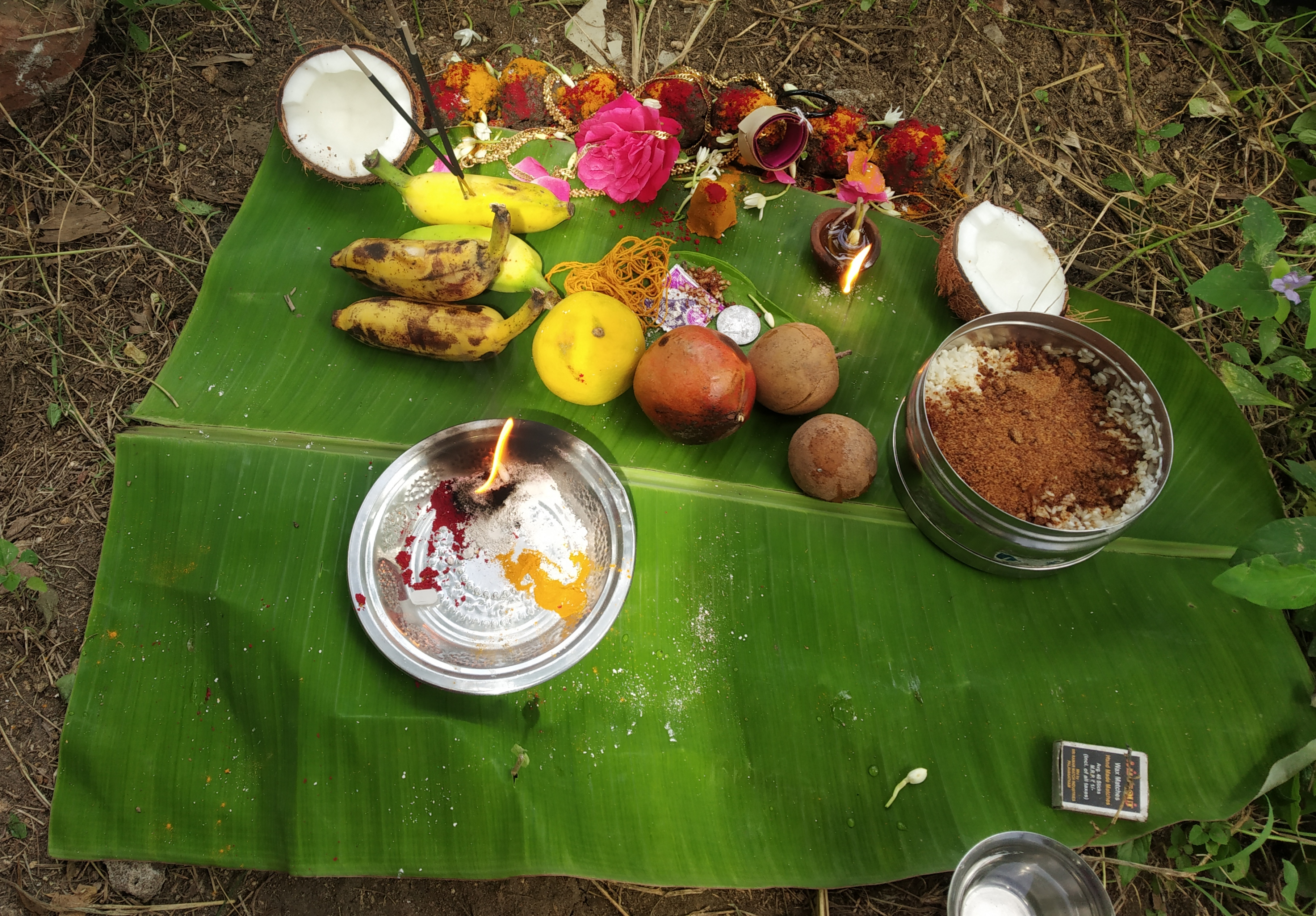 ஆடி 18 நாளன்று வணங்கப்படும் கன்னிமார் வழிபாடு.